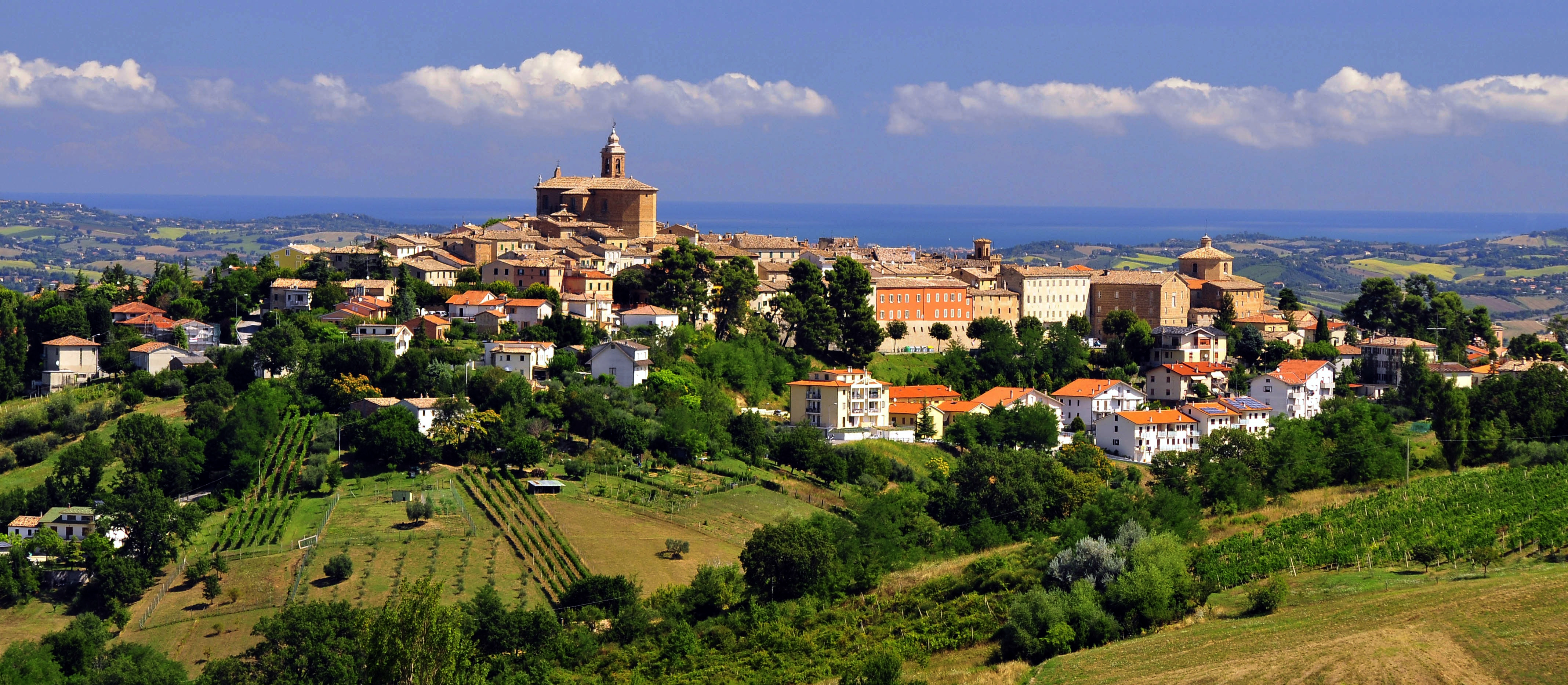 Vista panoramica di Montecarotto da Poggio San Marcello